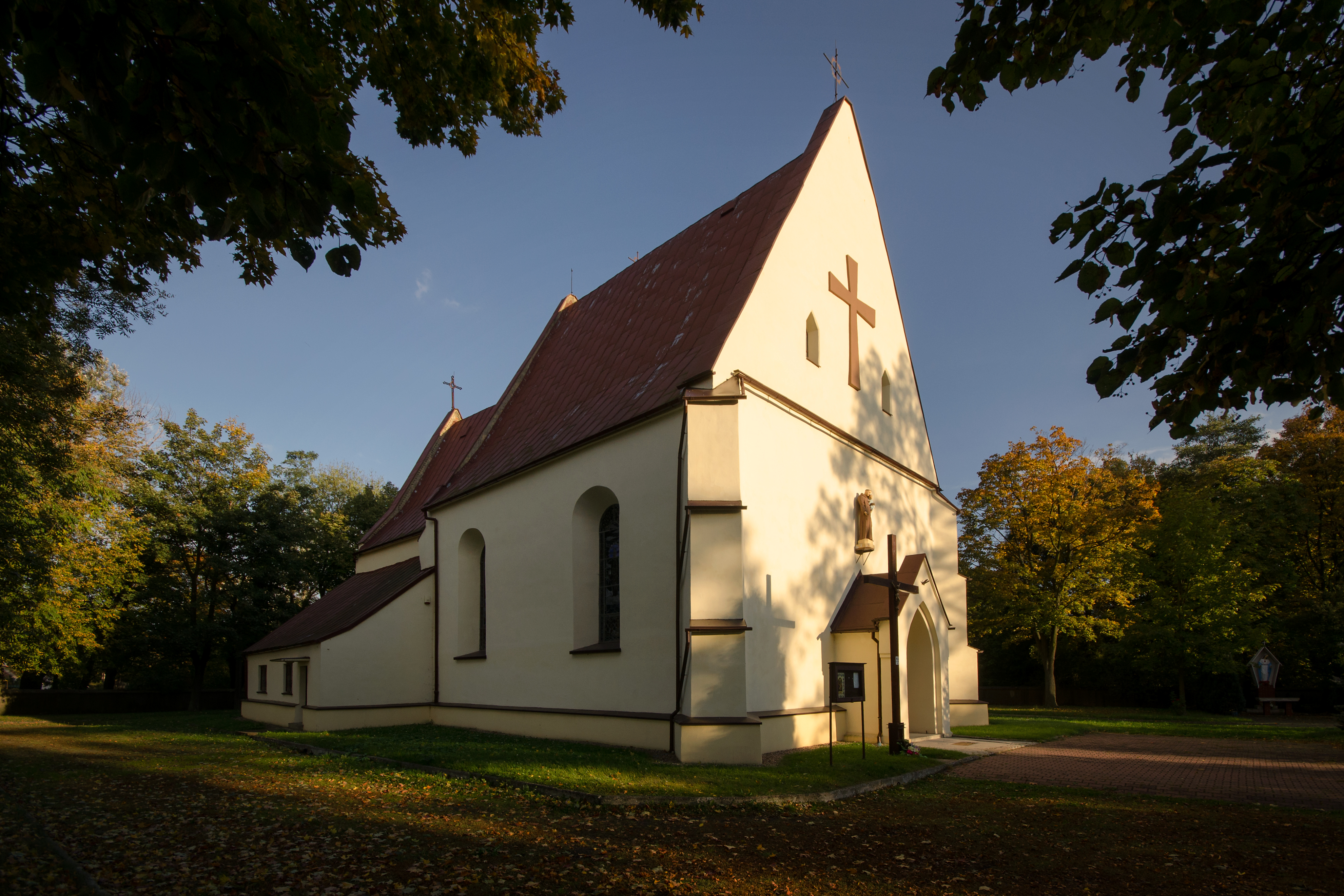 Niemstów, kościół fil. p.w. św. Antoniego, XV, XVI, 1 poł. XVIII